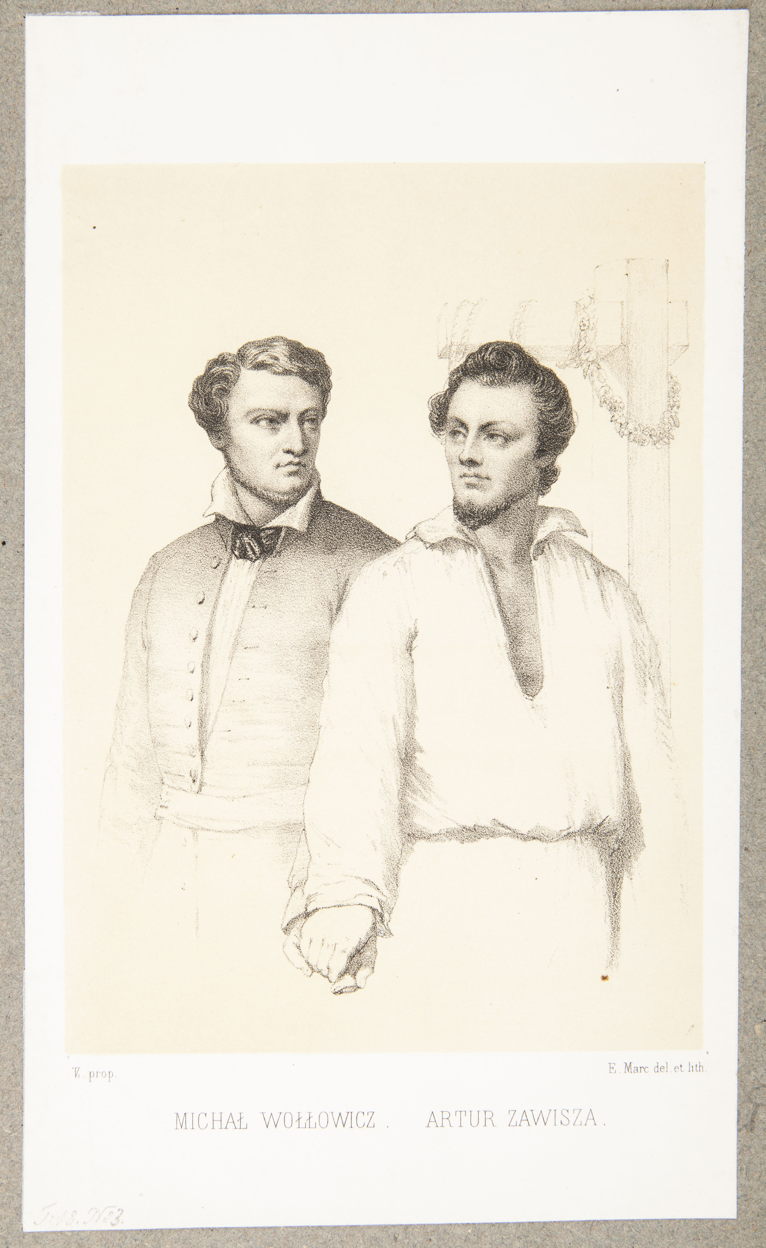 Беларуская (тарашкевіца): Паўстанцы Міхал Валовіч (Michał Vałovič) і Артур Завіша (Artur Zaviša) перад расейскім карным забойствам